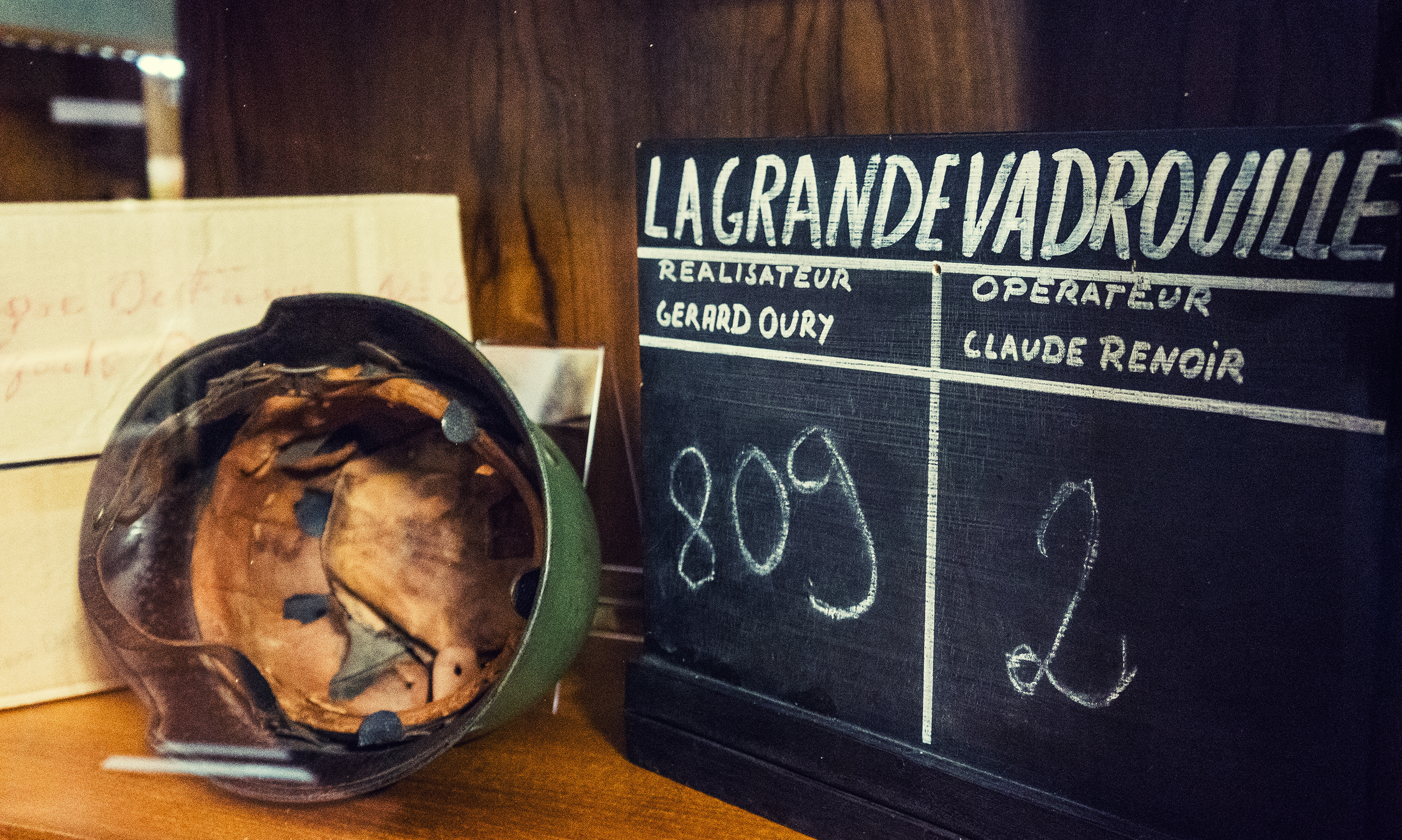 Accessoires du tournage du film La Grande Vadrouille avec Louis de Funès et Bourvil. Casque allemand et clap de tournage du film. Exposé au Musée Louis de Funès.